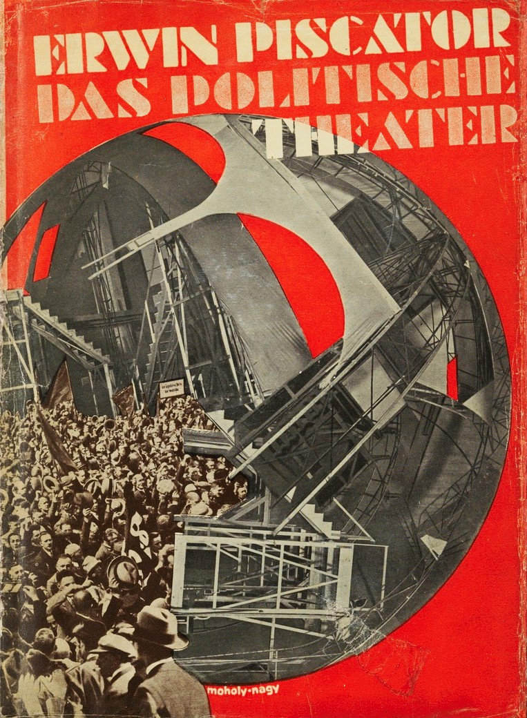 Erwin Piscator: Das politische Theater, Berlin, Adalbert Schultz Verlag, 1929. Schutzumschlag von László Moholy-Nagy